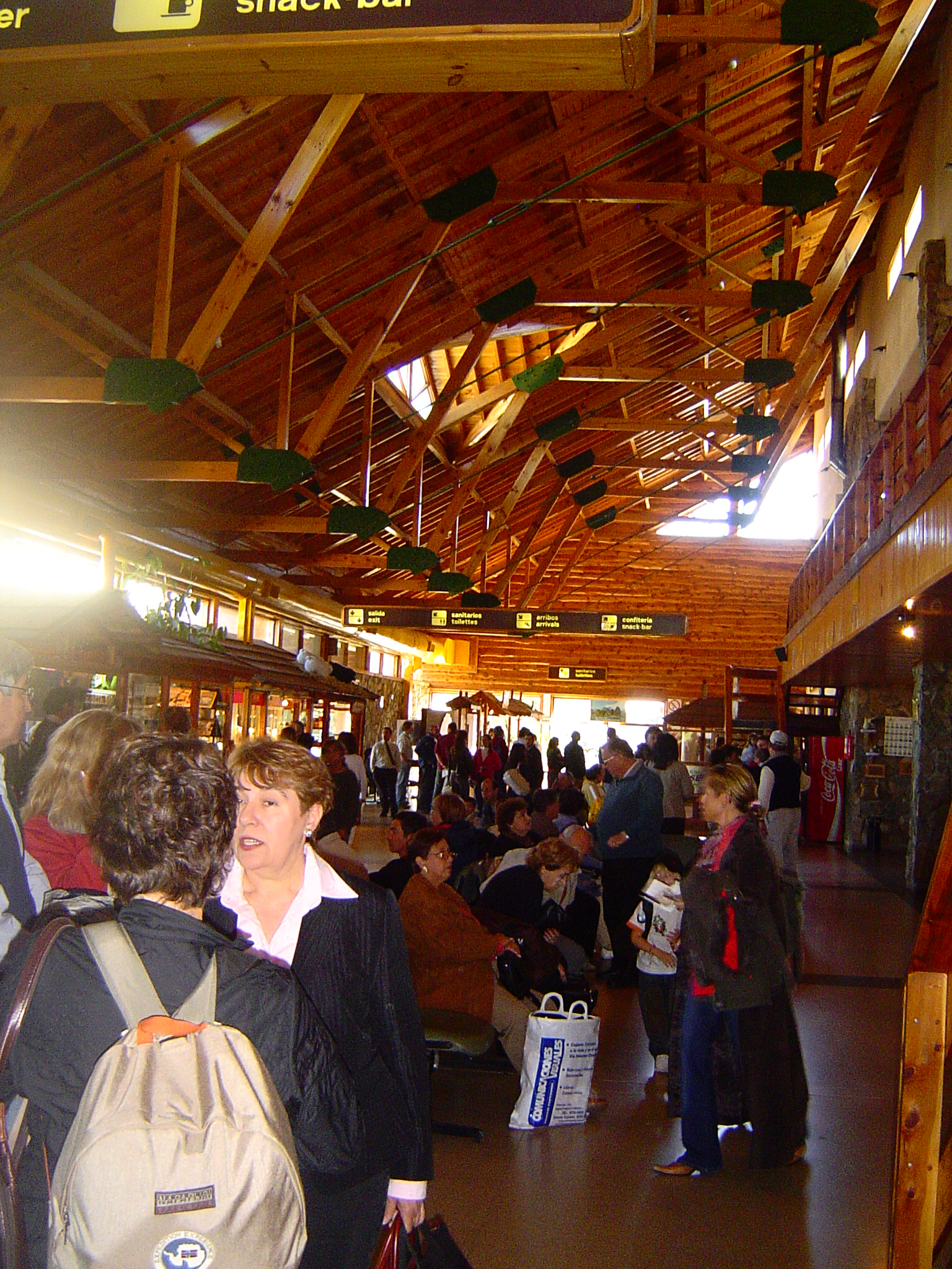 Interior del aeropuerto Aviador Carlos Campos. Pcia. de Neuquén. Fotografía del 18 de marzo de 2006.